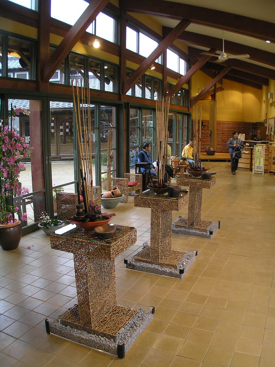 宇川温泉よし野の里館内